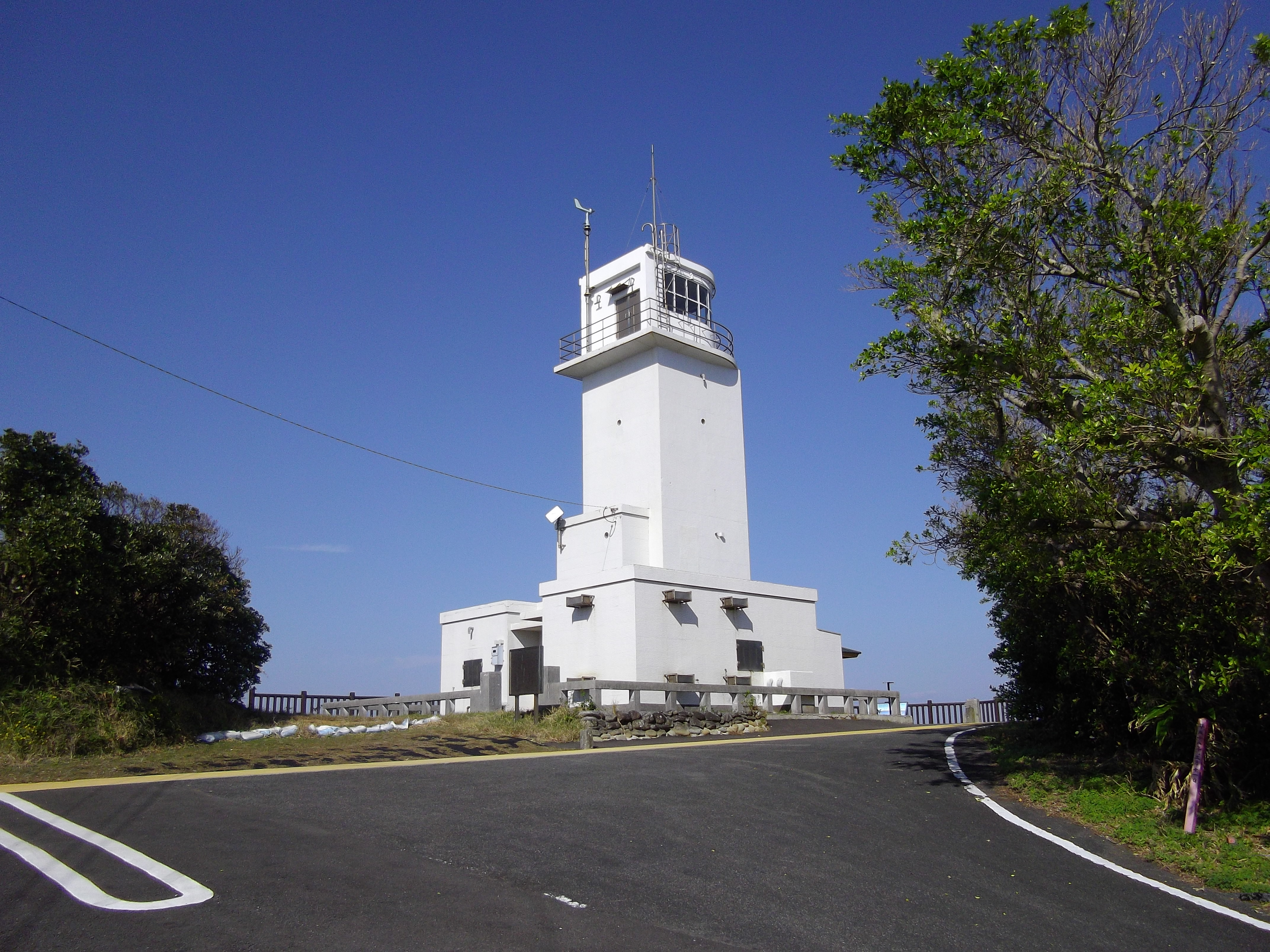 希志碕燈台